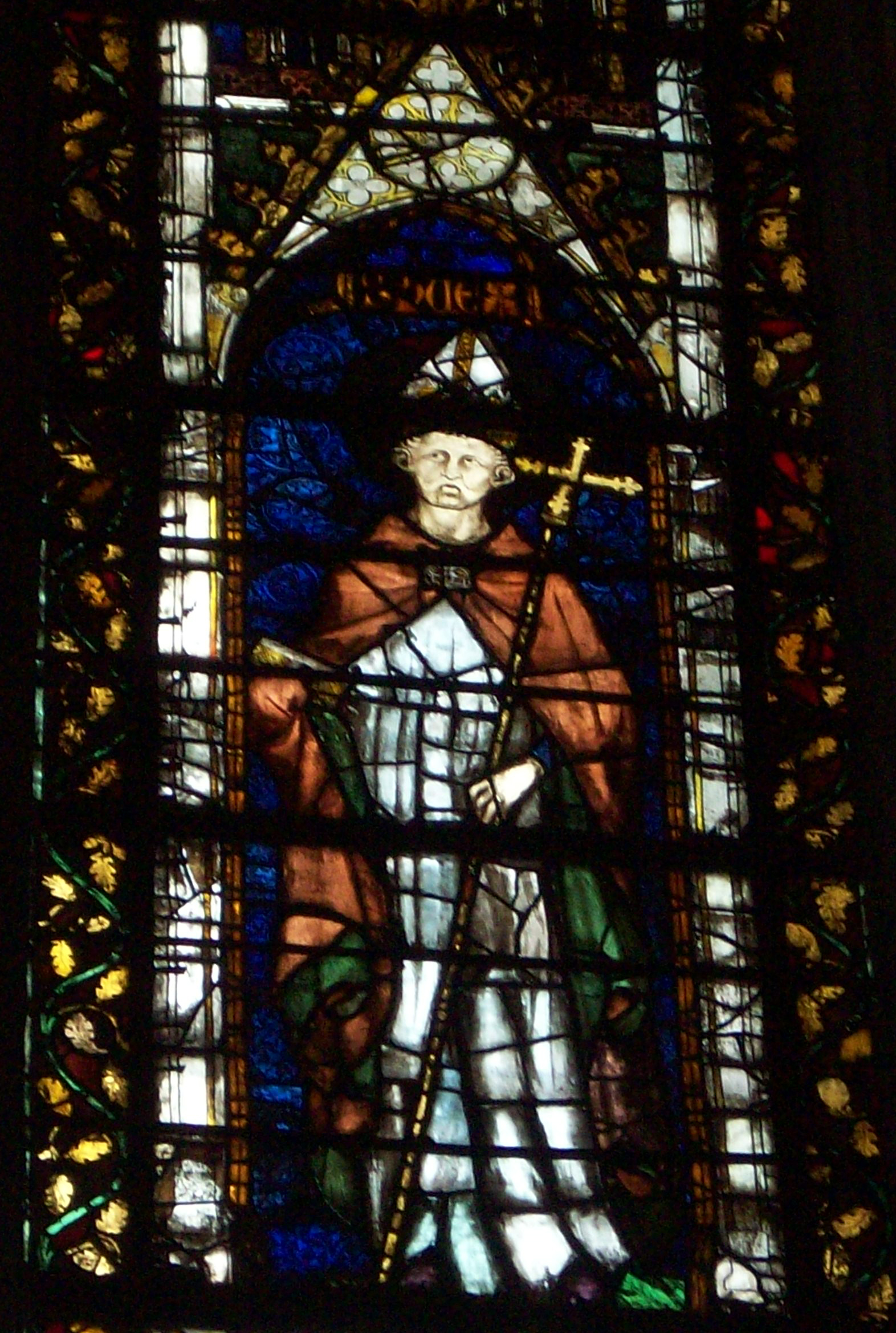 Vitrage de Hugues de Rouen.